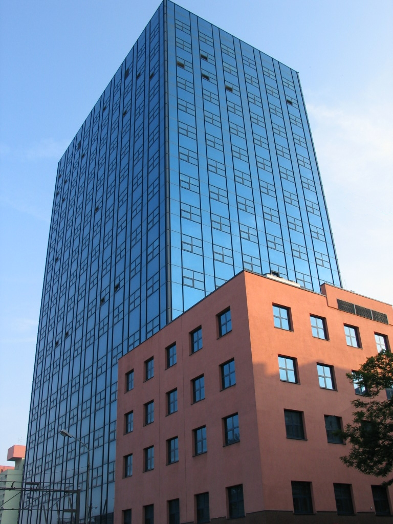 Blue Tower Łódź